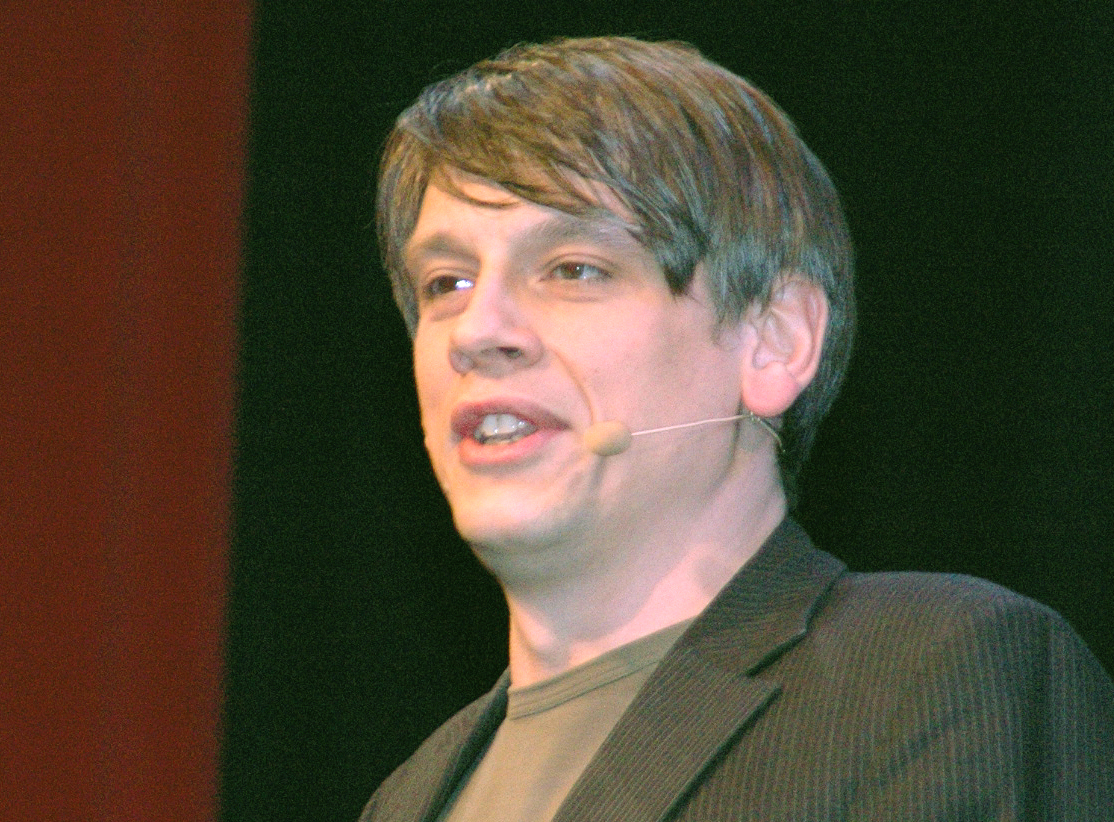 Mathias Tretter auf der Kulturbörse in Freiburg 2008